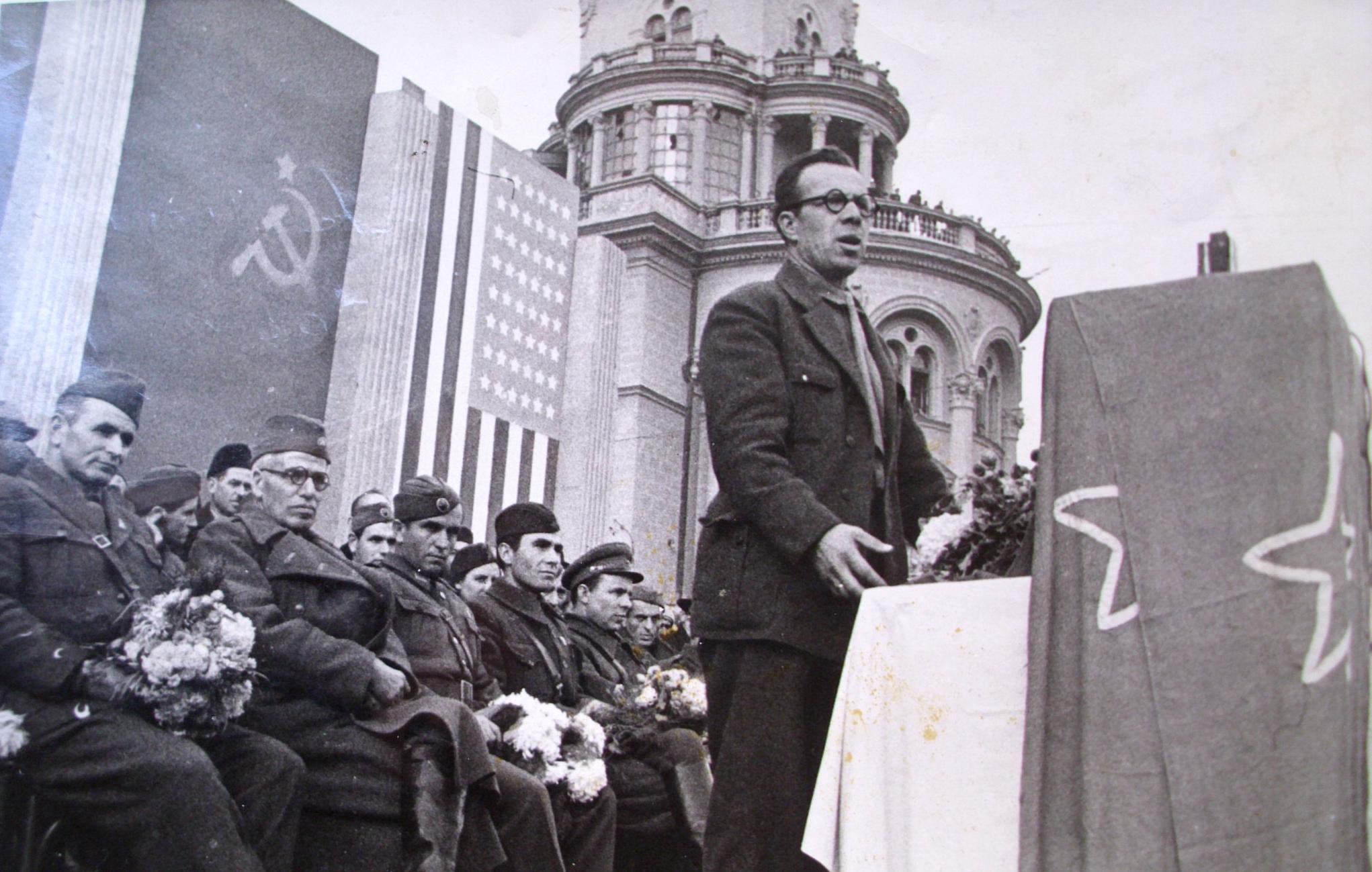 Емануел Чучков говори во слободно Скопје, 1945 година